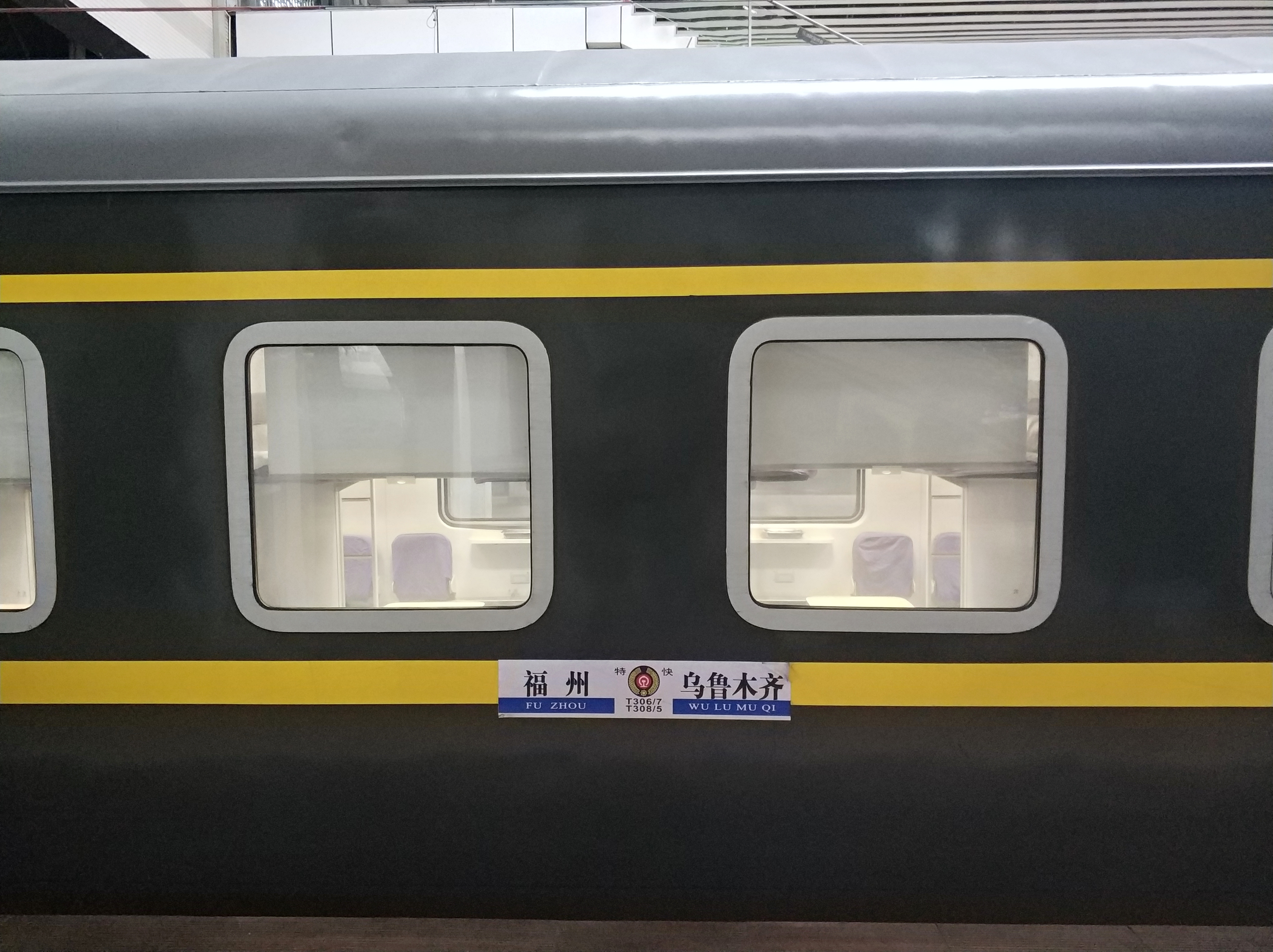 中文（中国大陆）: 福州-乌鲁木齐